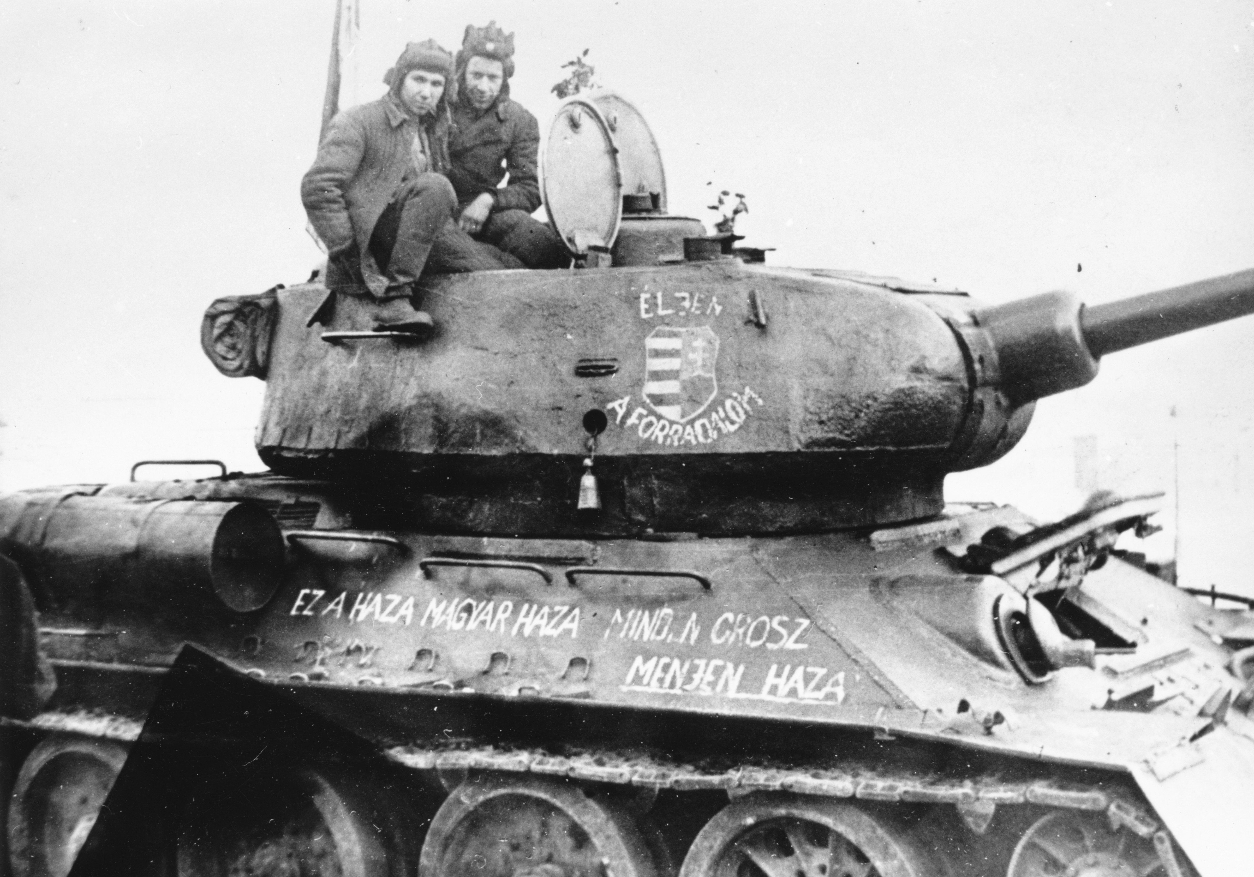 T34/85 típusú harckocsi. Location: Hungary, Budapest Tags: military, tank, Soviet brand, crest, label, revolution Title: T34/85 típusú harckocsi.